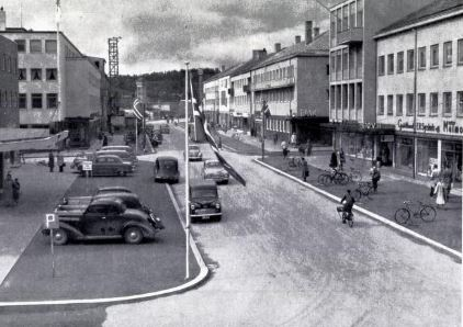 Gjenreisningsbyen Steinkjer. Reprofoto.